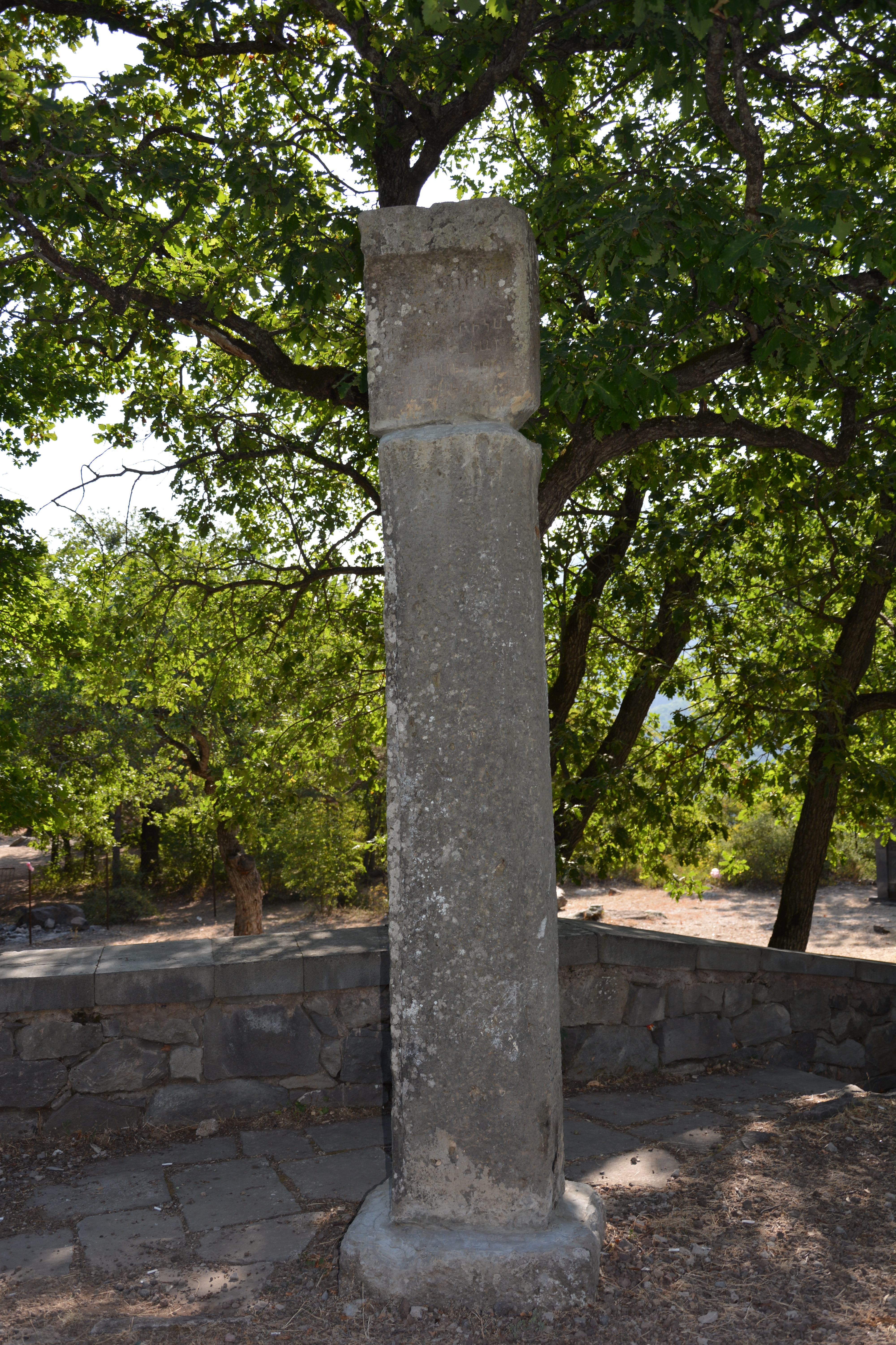 Հուշաքար Խրիմյան Հայրիկի 54/6